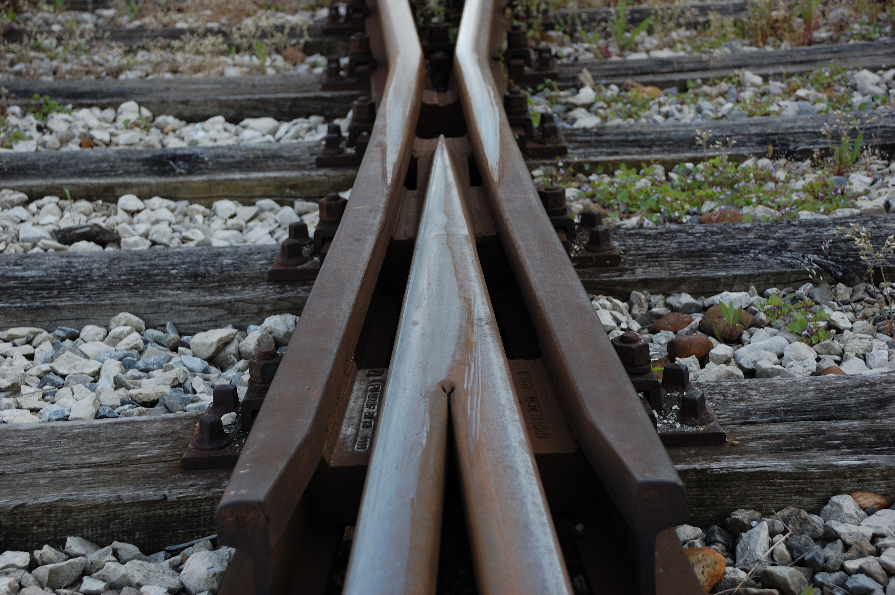 DSC_6762, Herzstücklücken einer Eisenbahnweiche